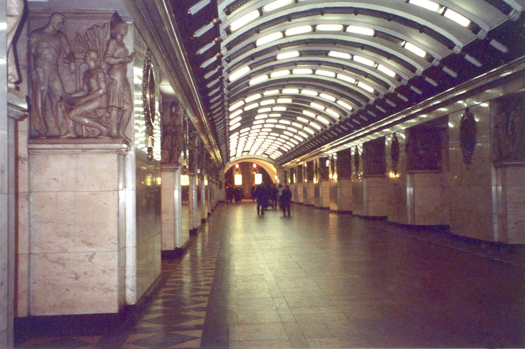 Станция метро «Нарвская»